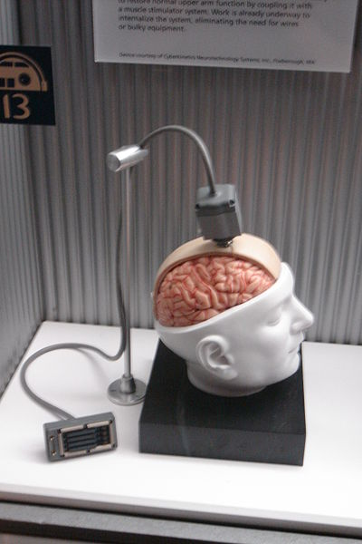 Maqueta de un sistema BCI intrusivo.